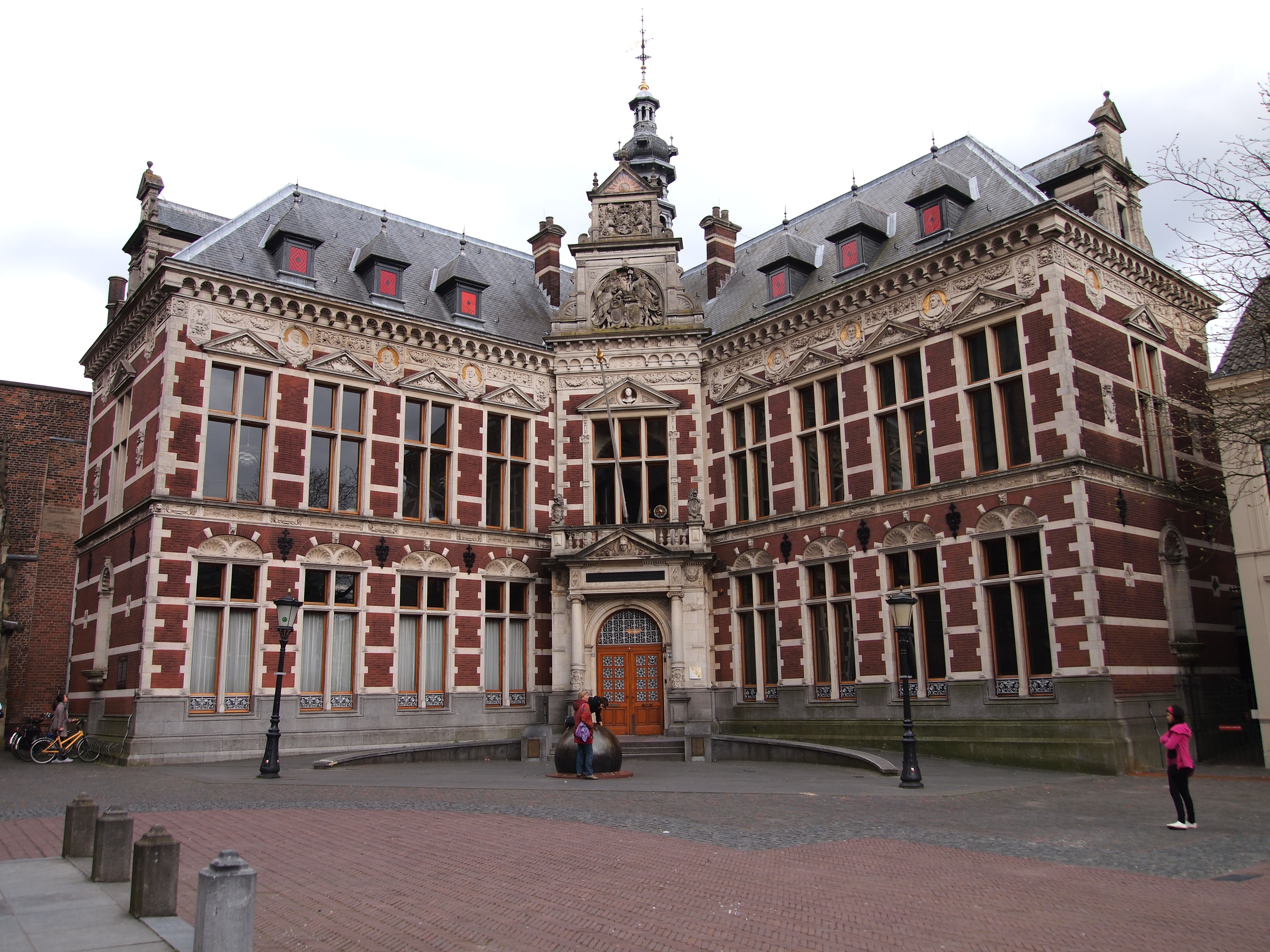 Academiegebouw Onderwijs en wetenschap Onderwijs en wetenschap, Domplein 29, Utrecht